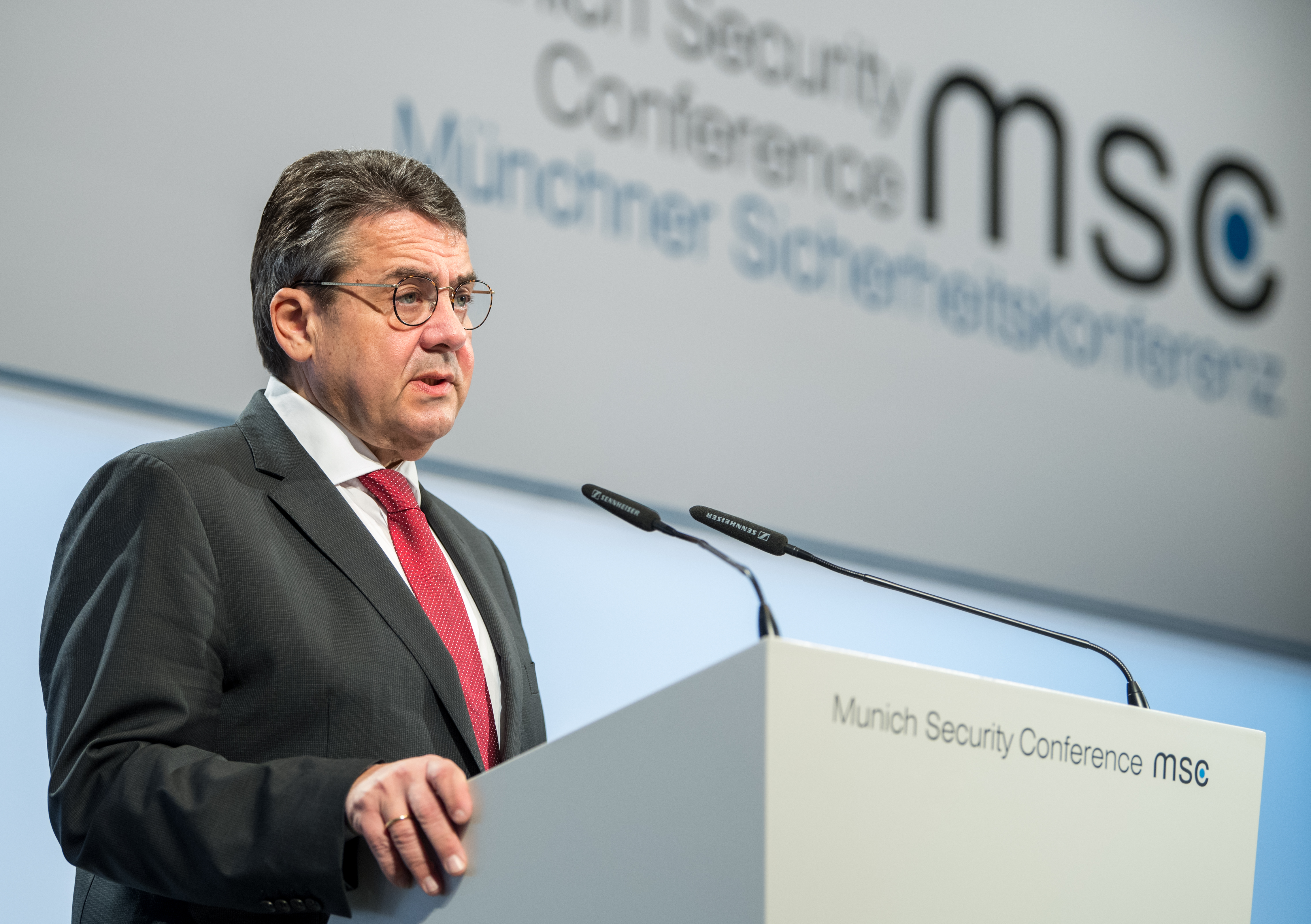 Sigmar Gabriel während der Münchener Sicherheitskonferenz 2018